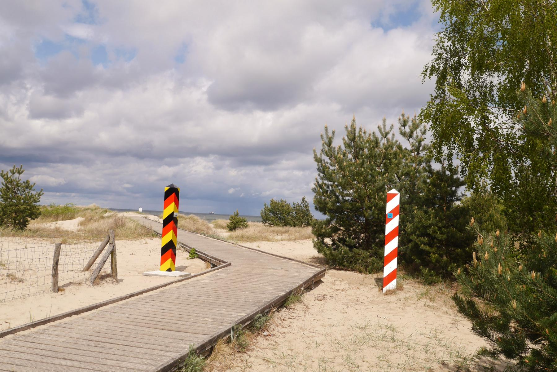 Die Deutsch-Polnische Grenze an der Küste von Usedom 2016